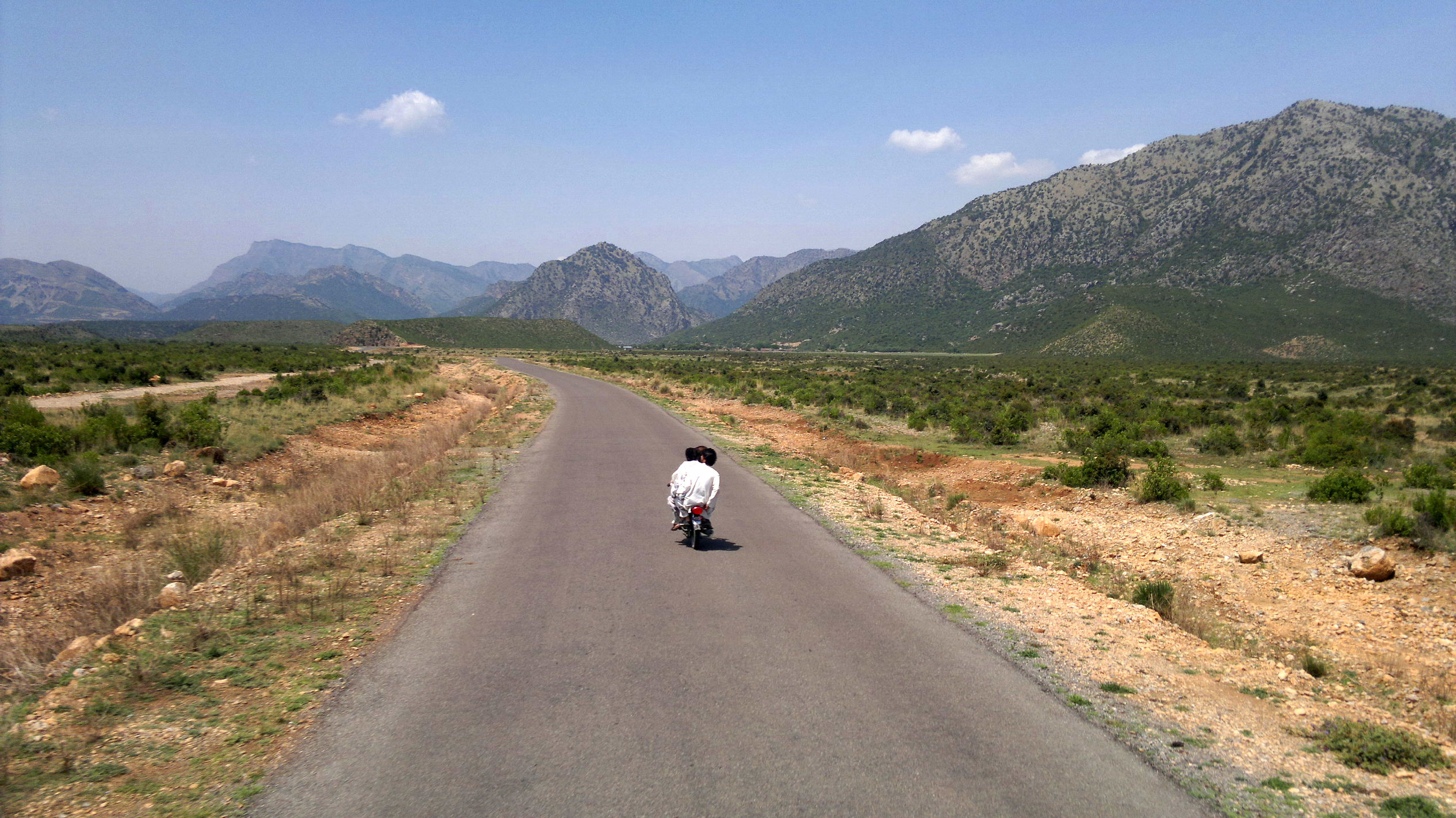 kalaya road kohat